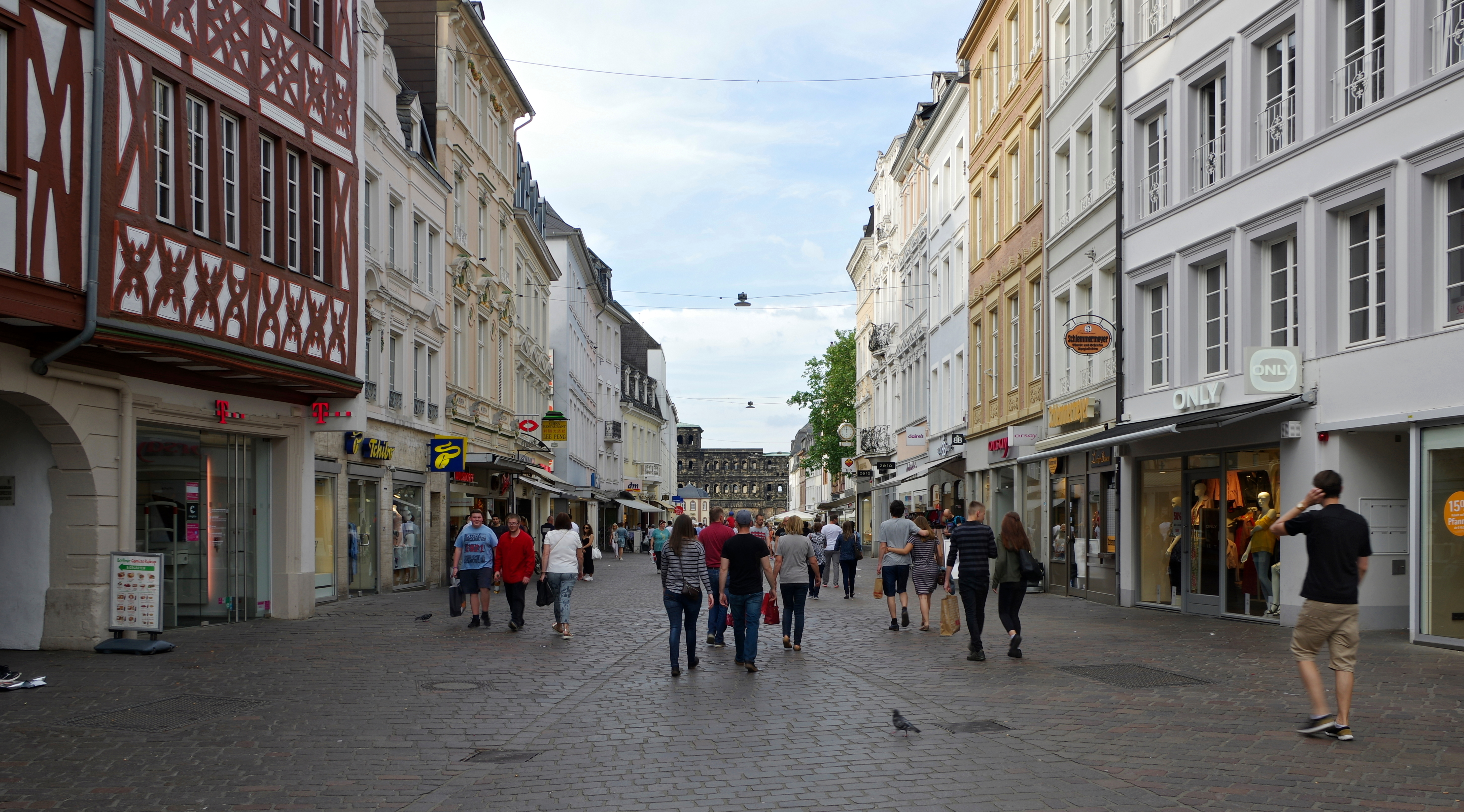 Trier, Simeonstraße, Blickrichtung nach Norden